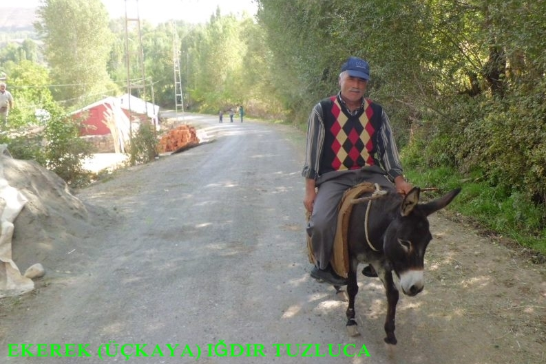 IĞDIR TUZLUCA EKEREK ÜÇKAYA KÖYÜ